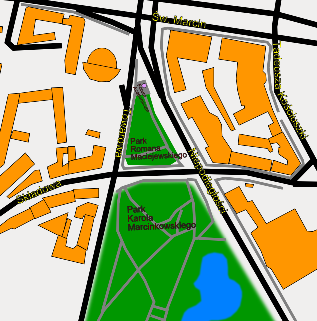 Park Romana Maciejewskiego w Poznaniu - plan